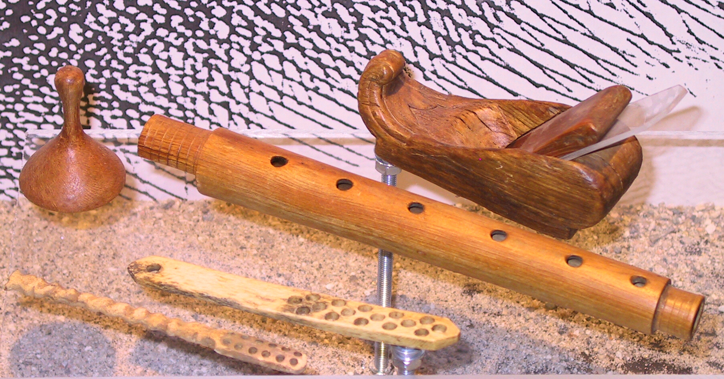 Fra Fredensborgutstillingen på Aust-Agder kulturhistoriske senter, Arendal. Fra vrakfunnet: En liten høvel, en fløyte (del), børstehandtak og spillebrikke.